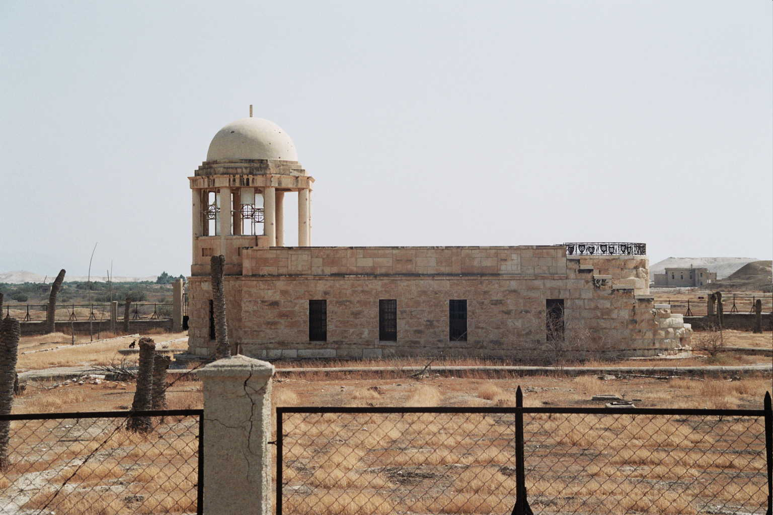 Franciscan Capella, Kasser Al Yahud